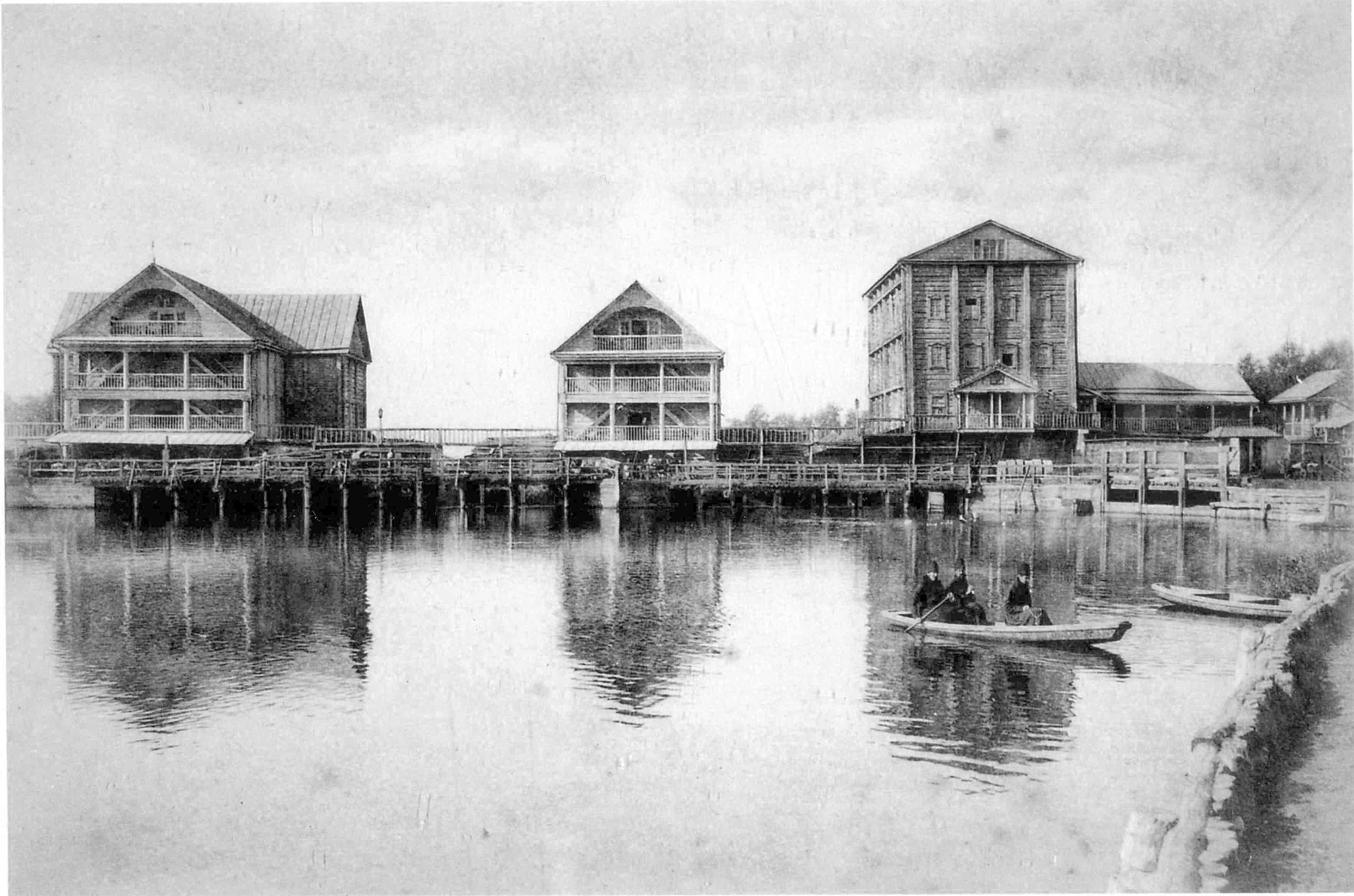 Монастырская мельница в селе Пруды